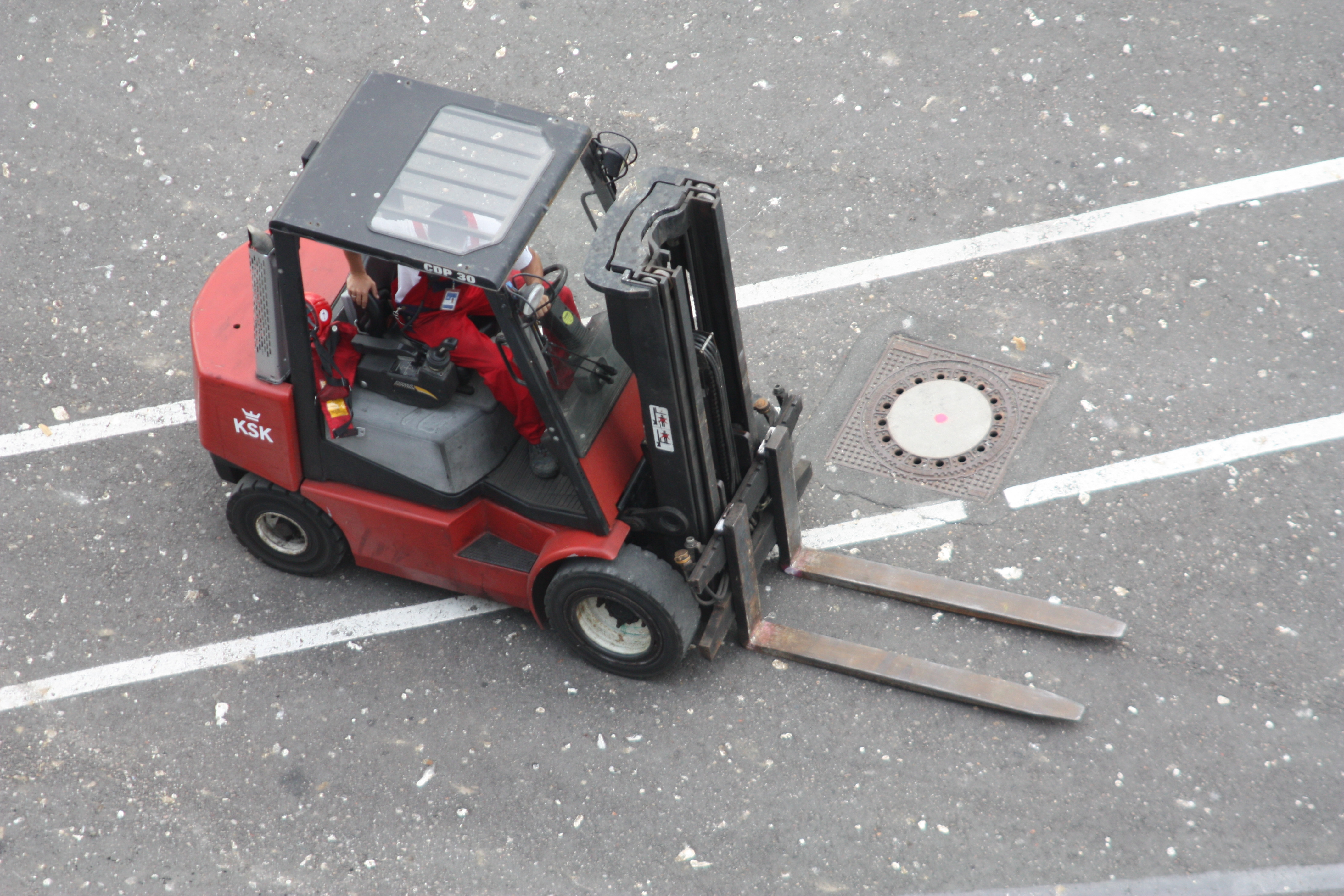 Gabelstapler im Hafen von Kiel